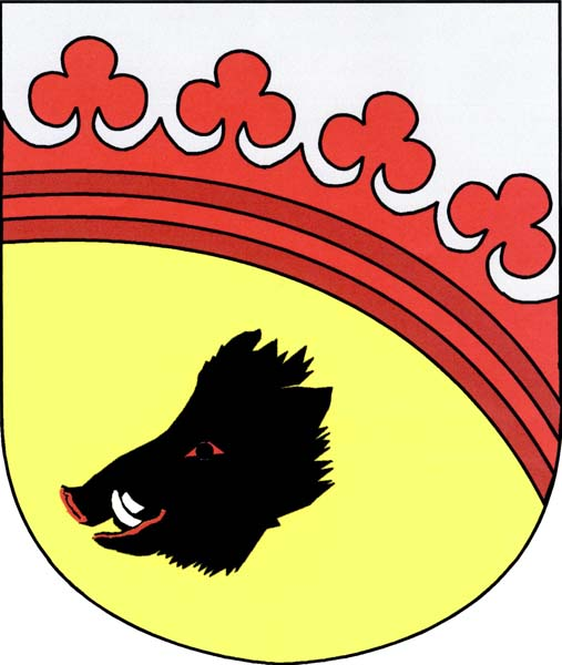 Znak obce Budětice